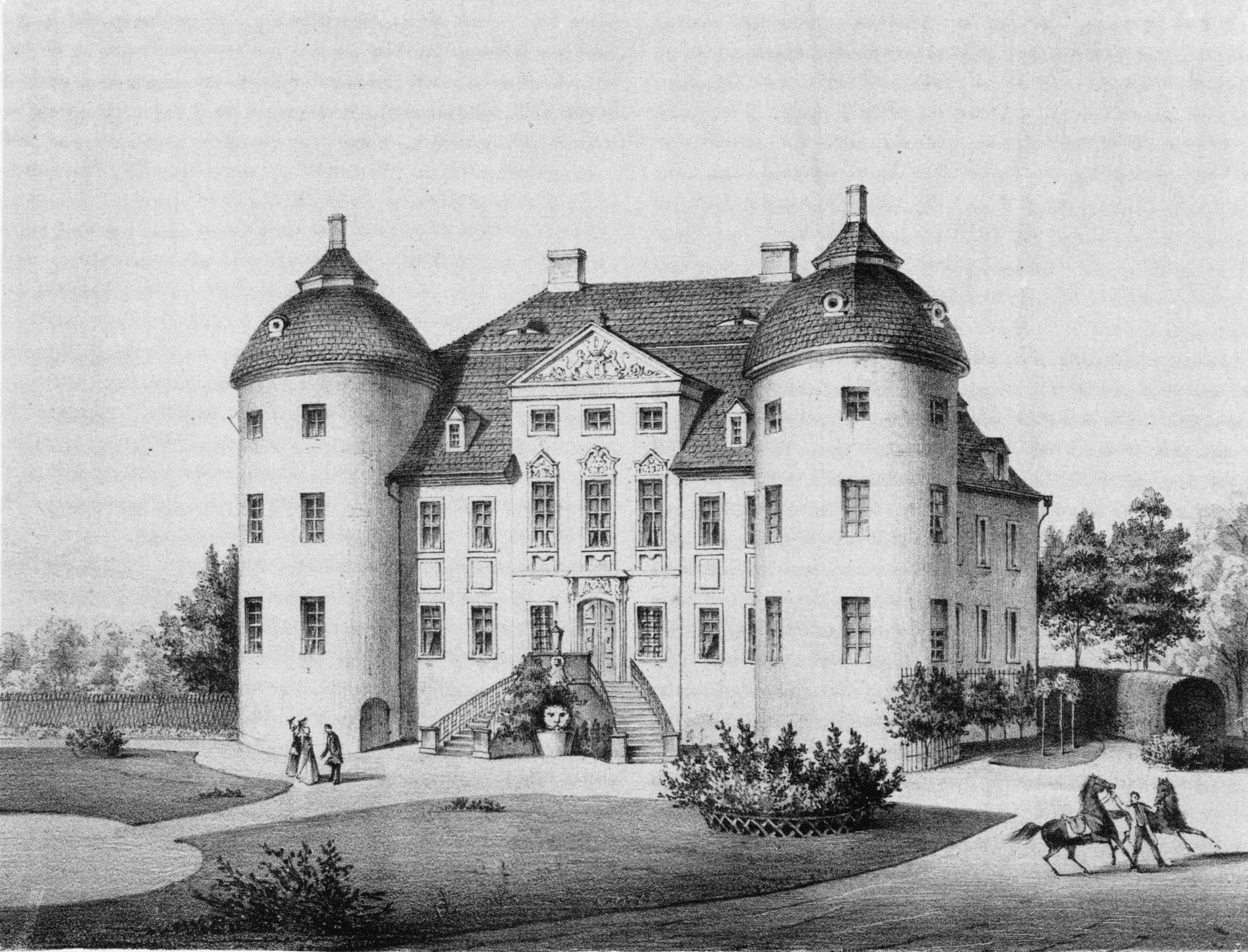 Das Rittergut Großschweidnitz Mitte des 19. Jahrhunderts